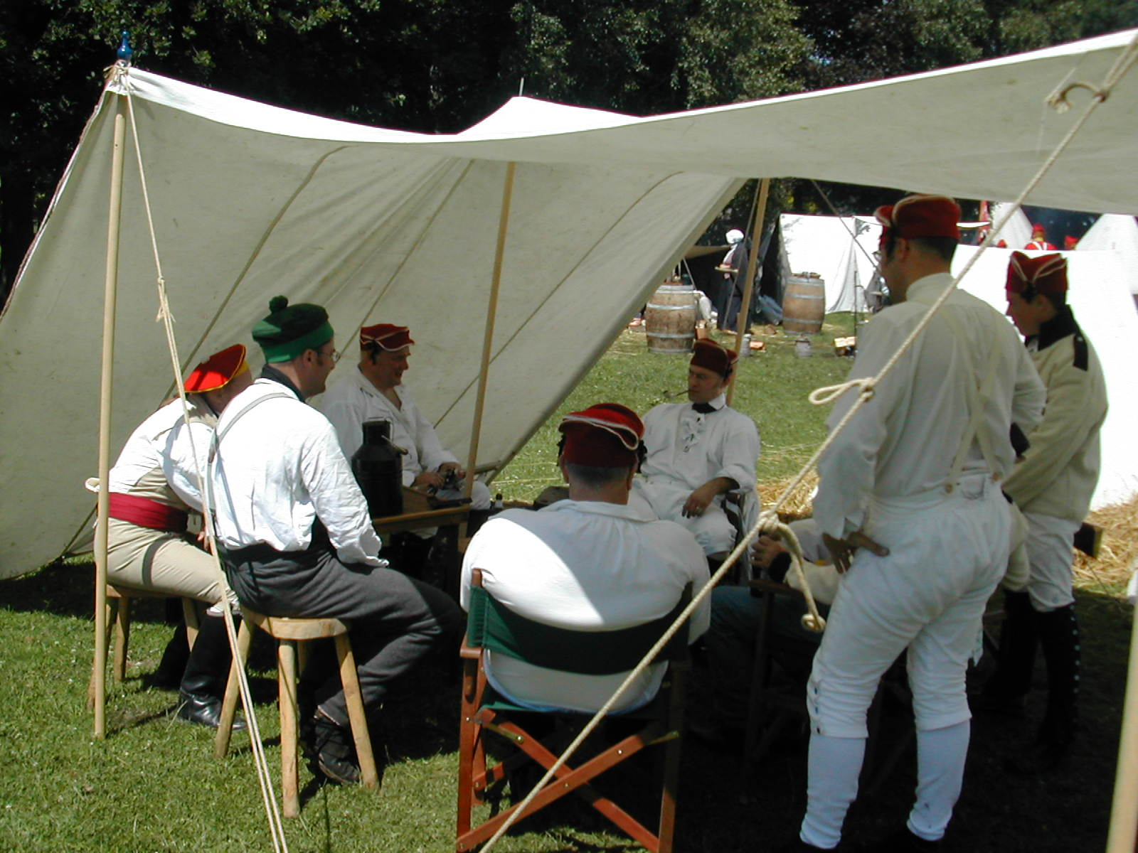 Bivouac Napoléonien. Reconstitution historique au dernier QG de Napoléon le 19 juin 2004.